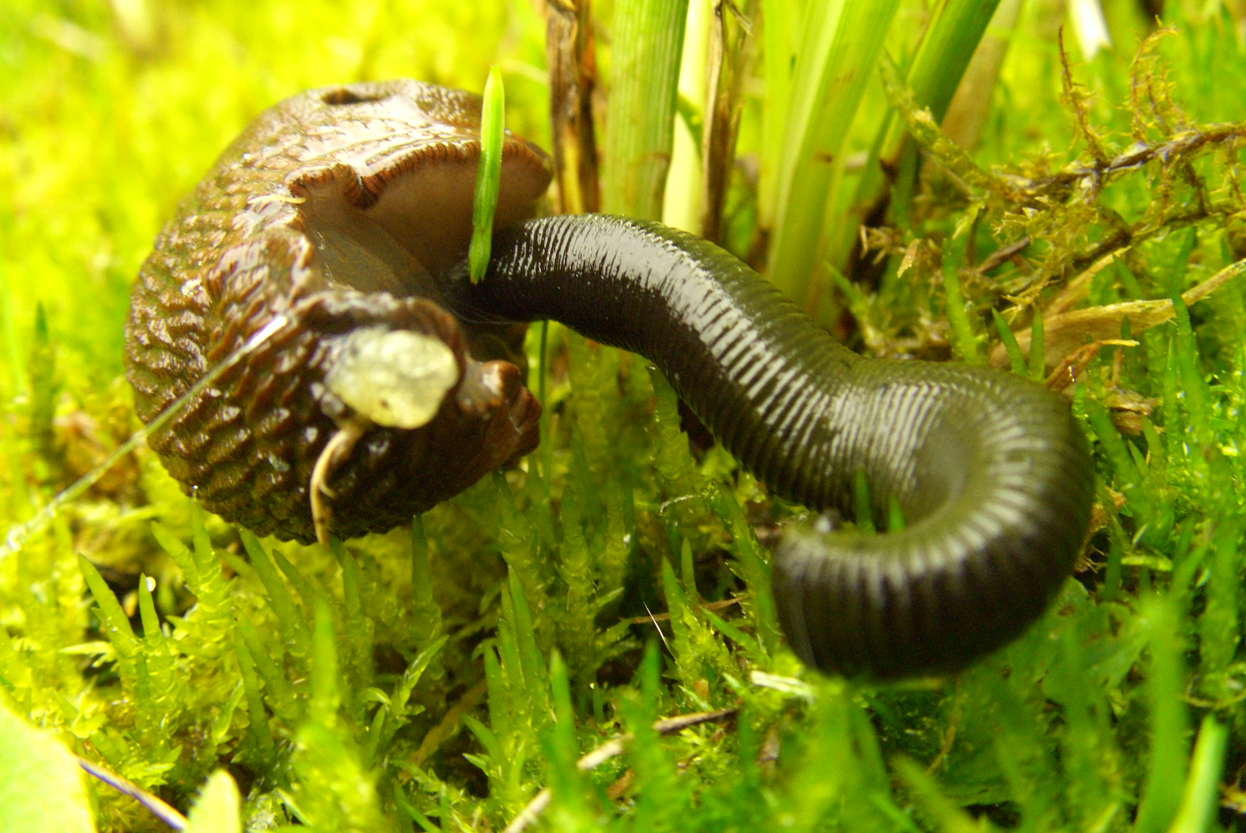 Blutegel als Parasit einer Nacktschnecke 05